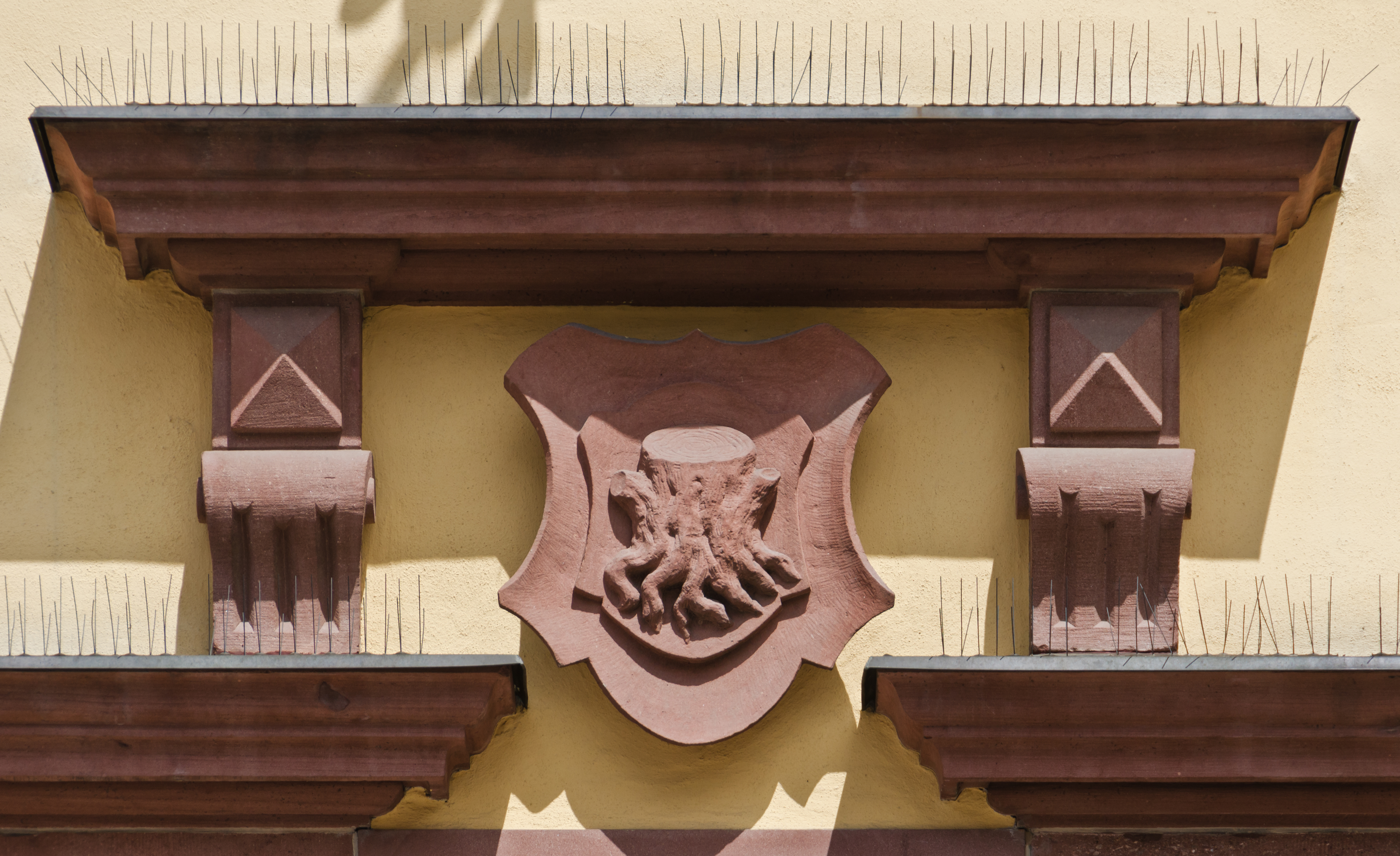 Nowa Ruda, ratusz, ok. 1845, 1892-1894